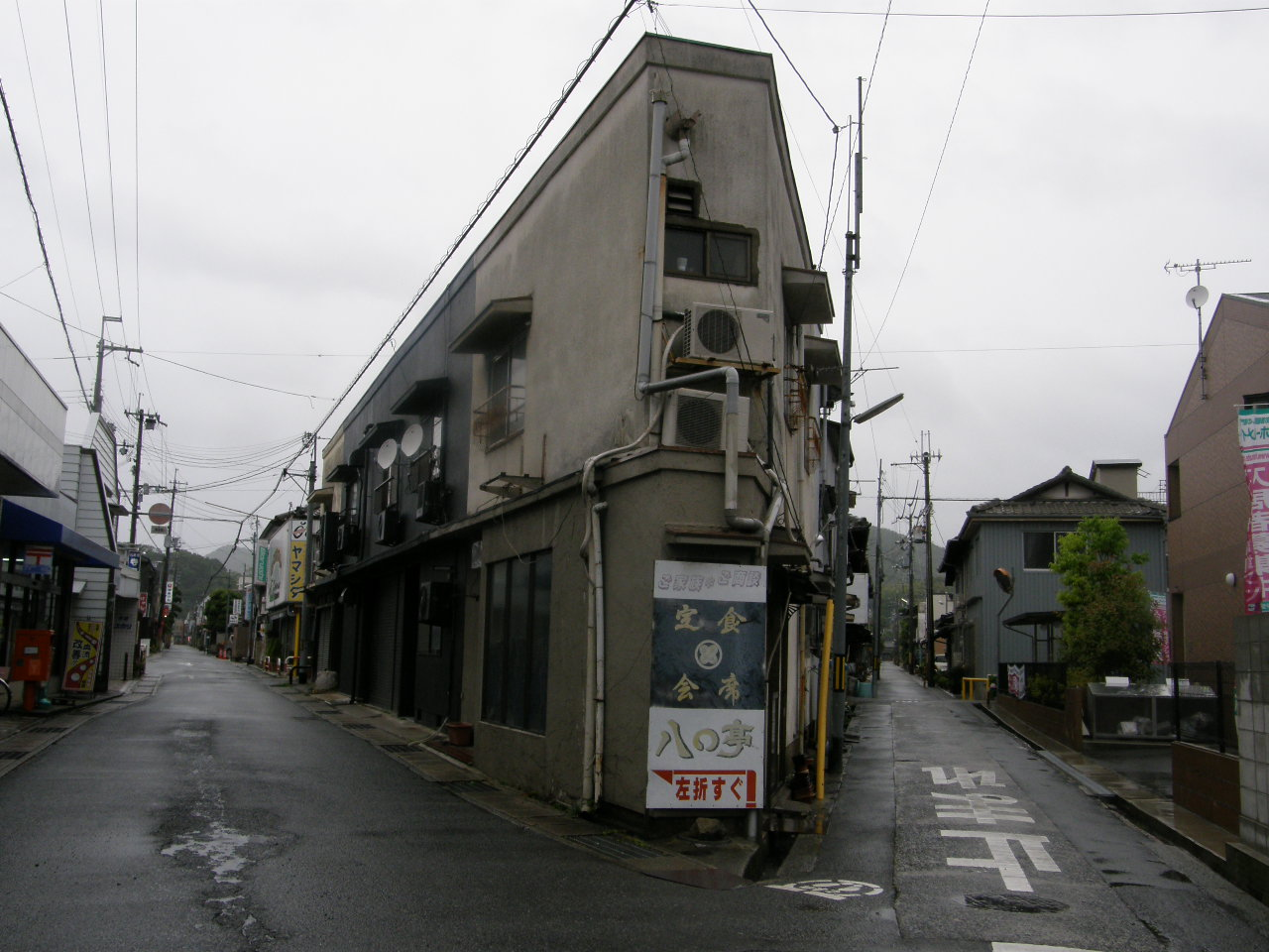 横尾忠則が描いた西脇市の三叉路